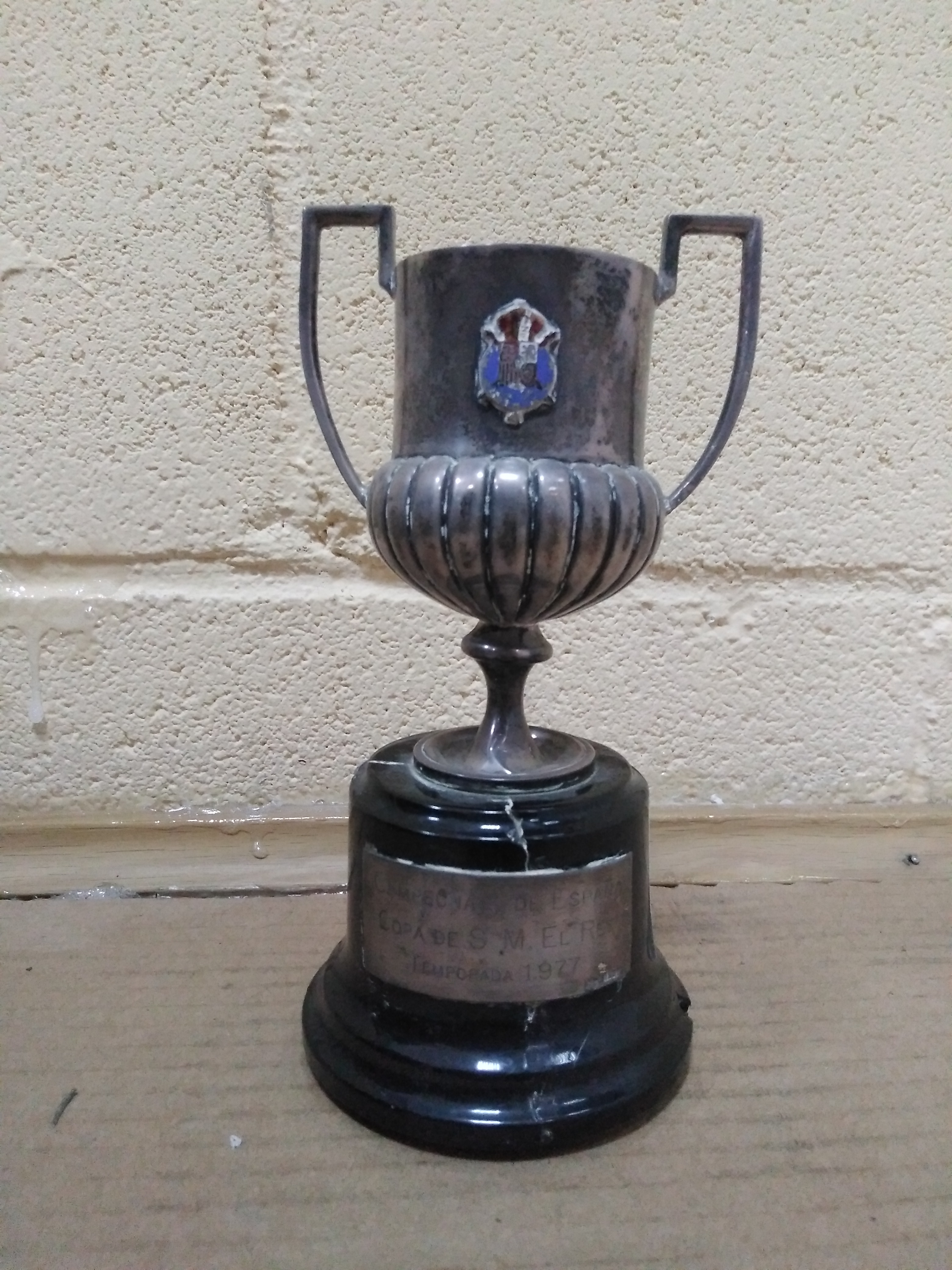 Réplica de la Copa del Rey de fútbol 1976-77 entregada a Antonio Benítez Fernández